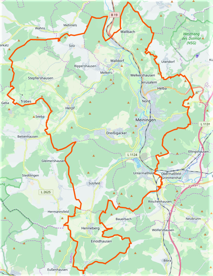 Erfüllende Gemeinde Meiningen mit der Stadt Meiningen und als erfüllte Gemeinden die Orte Rippershausen, Sülzfeld, Untermaßfeld.